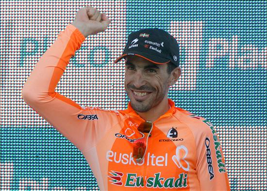 Egoi Martinez